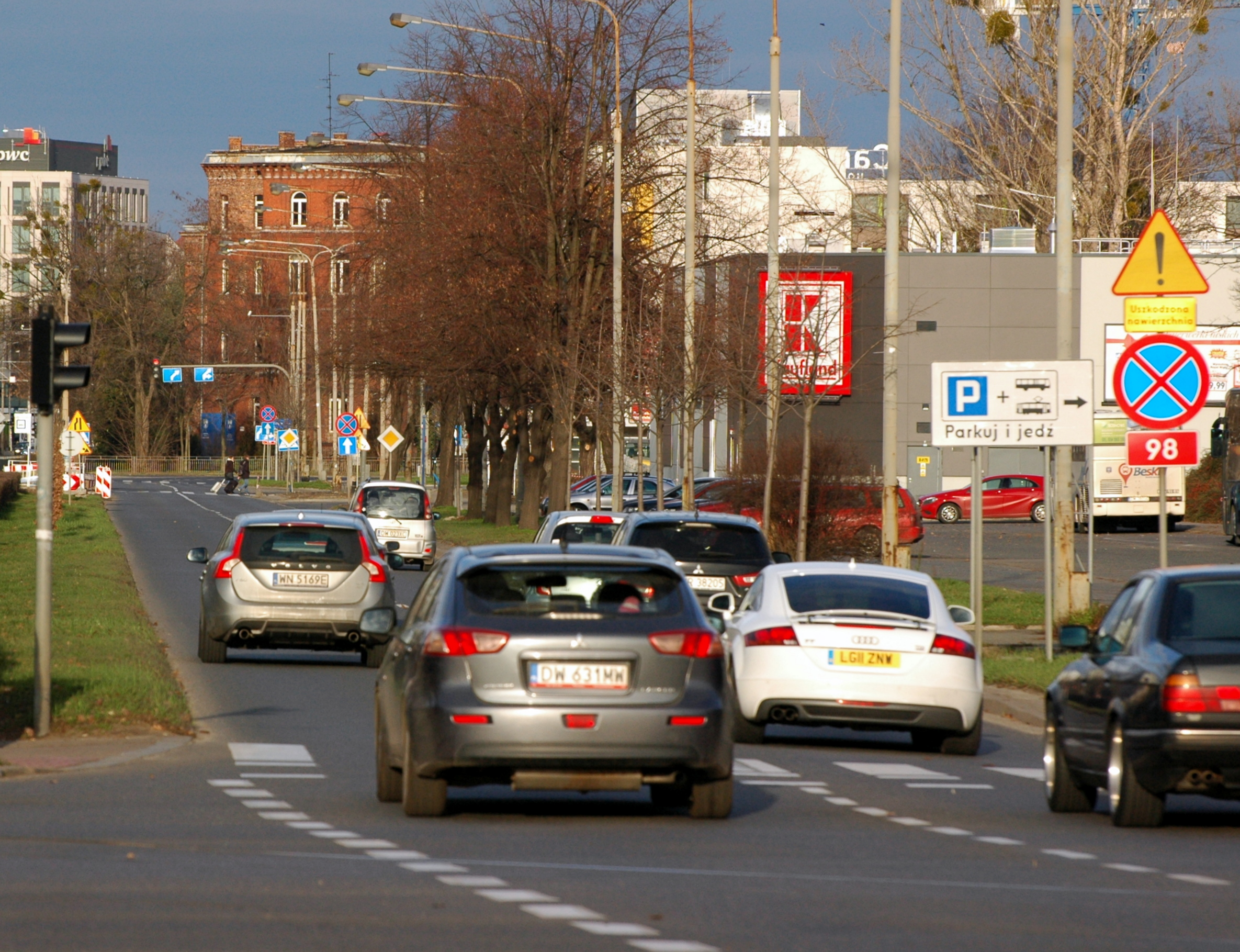 Droga krajowa nr 98 we Wrocławiu